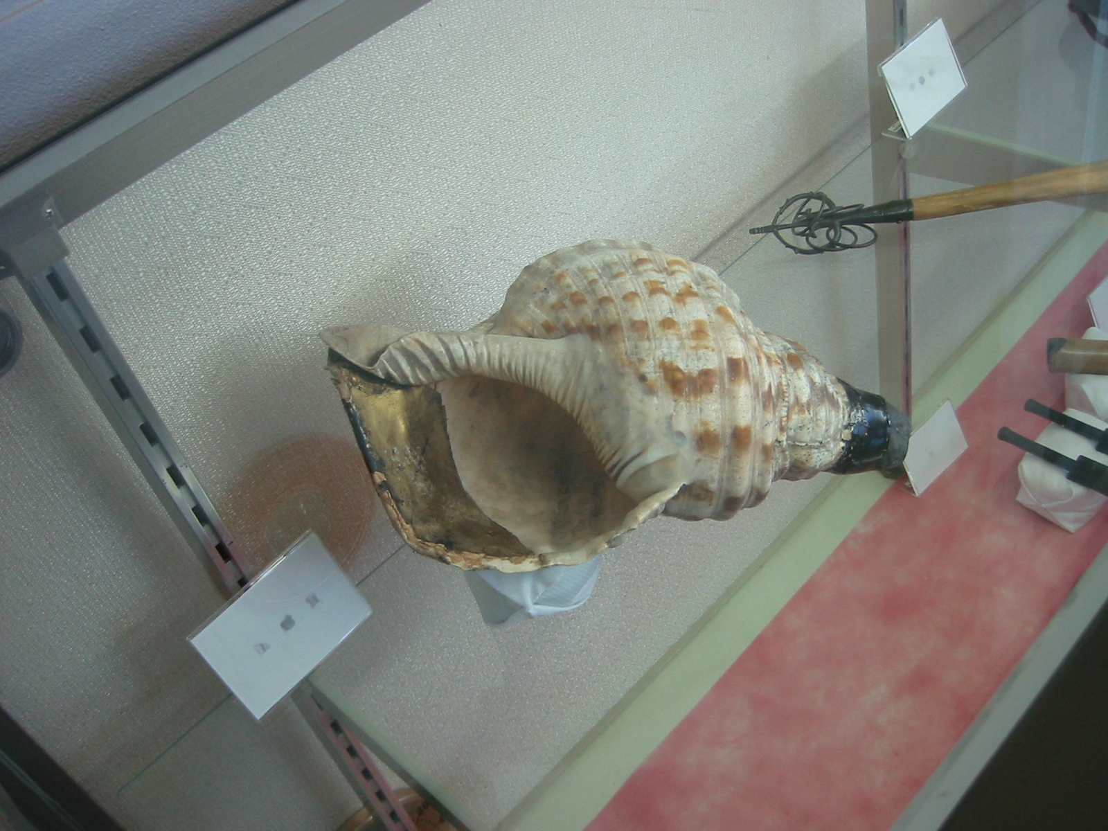 岐阜城資料館にて